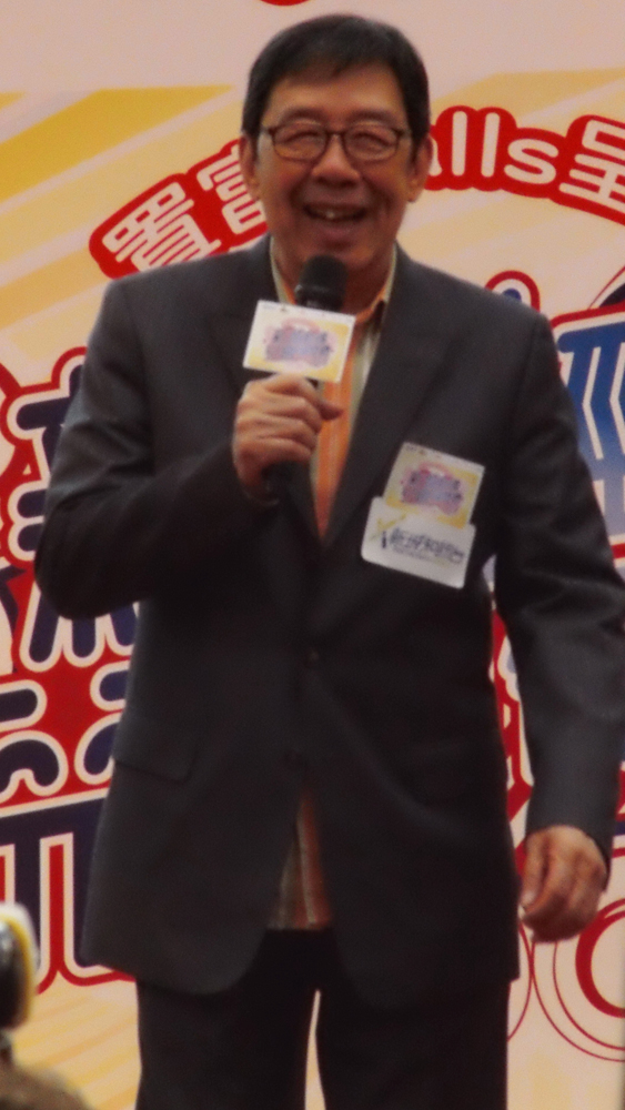 中文（香港）: 胡楓的樣子